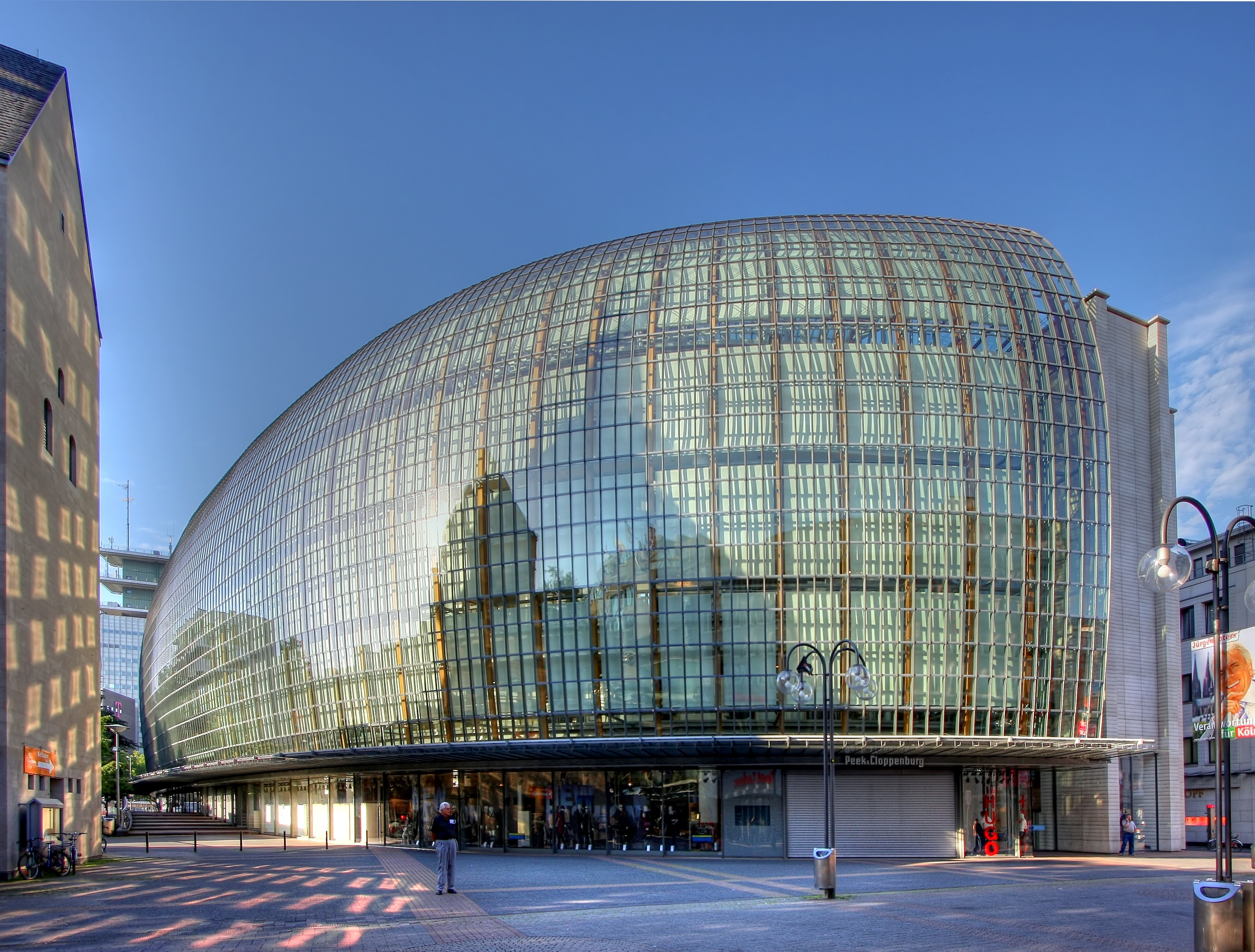 Weltstadthaus in Köln. Ansicht von der Schildergasse. Hauptmieter: Peek & Cloppenburg. Architekt: Renzo Piano.